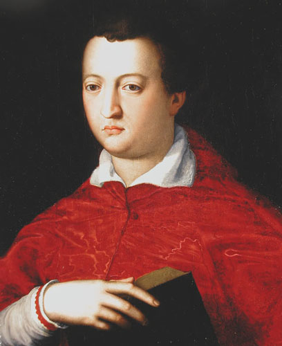 Cardinale Giovanni di Cosimo I de' Medici, Arcivescovo di Pisa